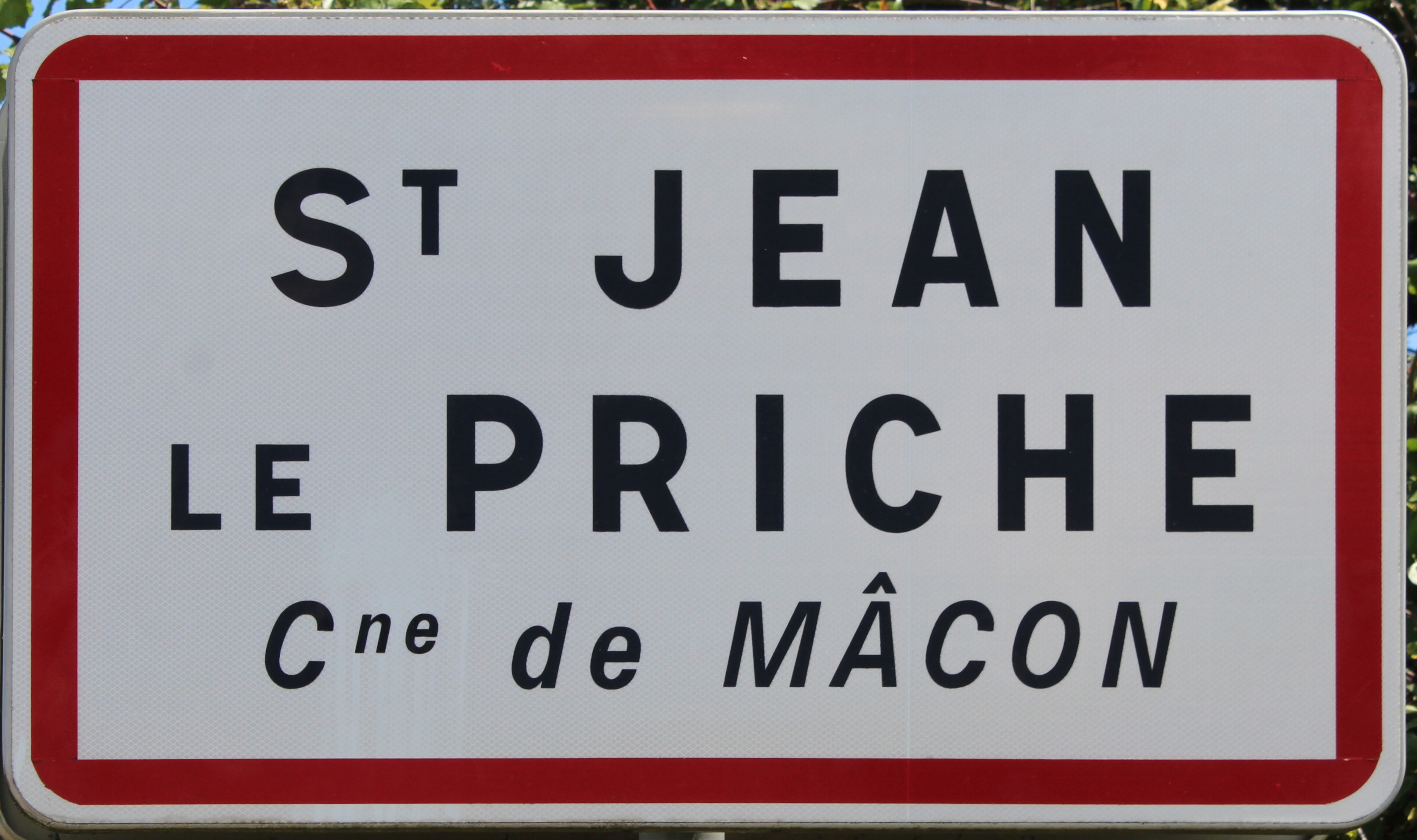 Panneau d'entrée dans la commune associée de Saint-Jean-le-Priche.